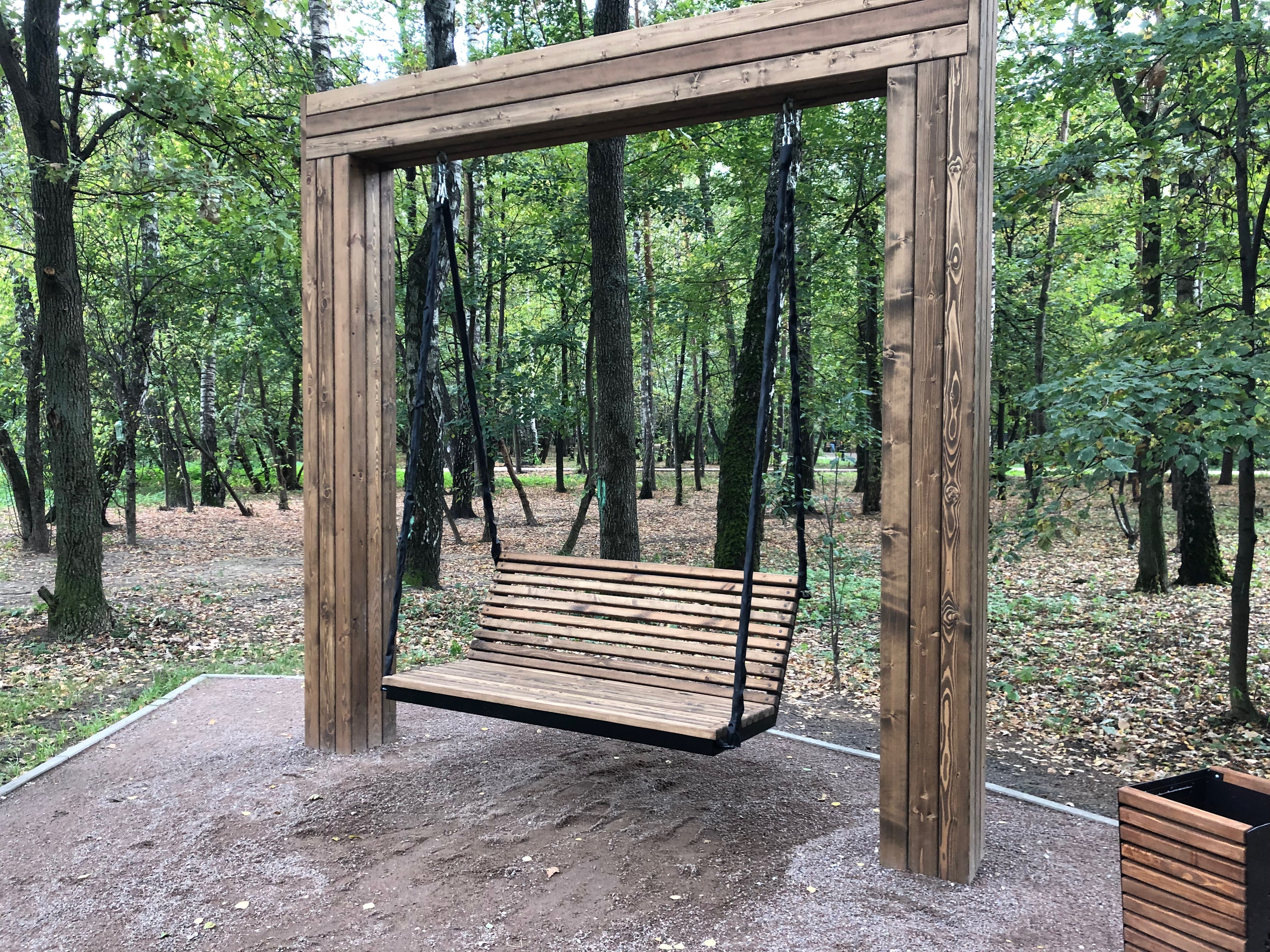 Большие качели в Ивановском лесопарке